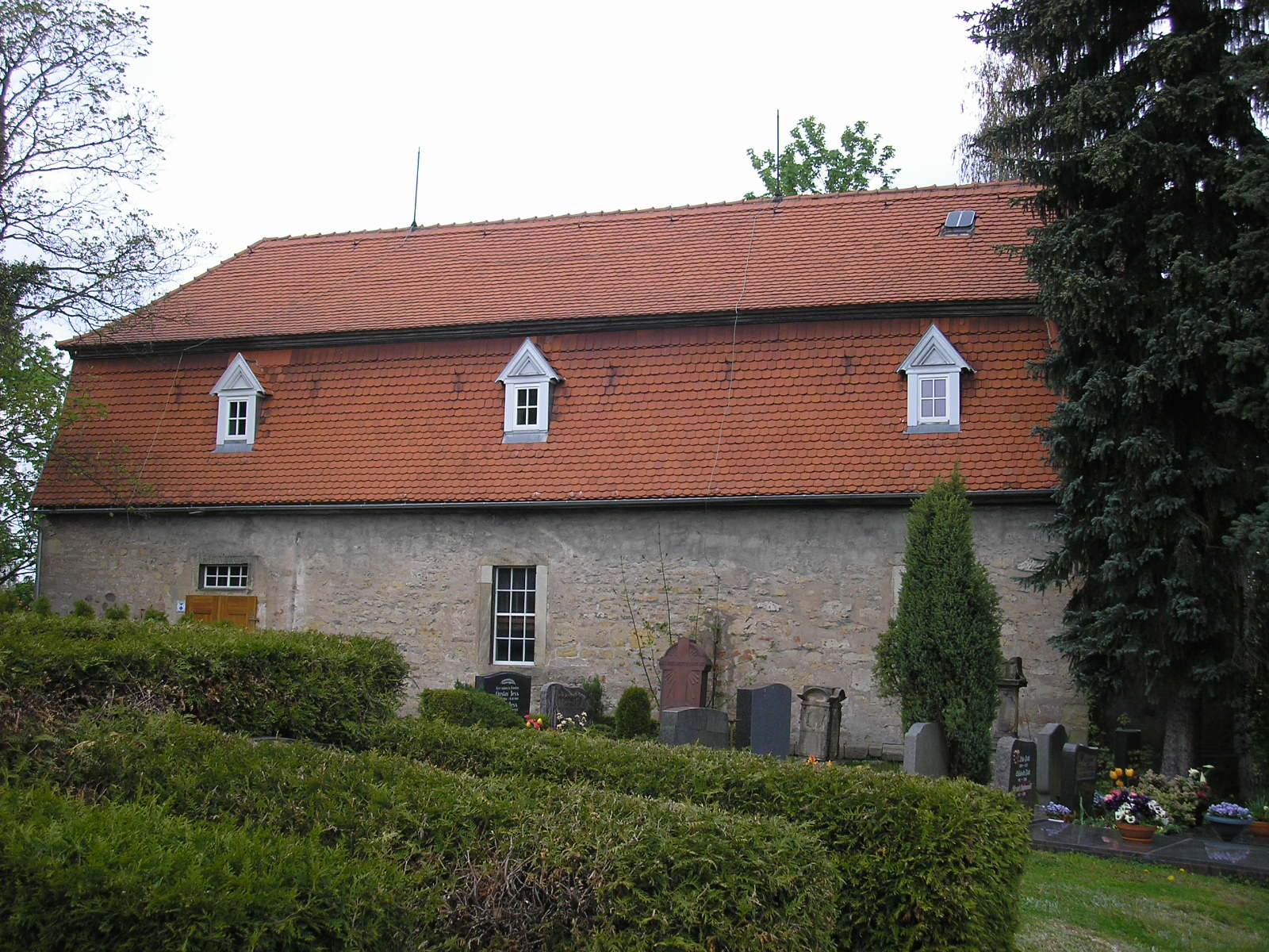 Die Friedhofskirche von Langewiesen (Thüringen).